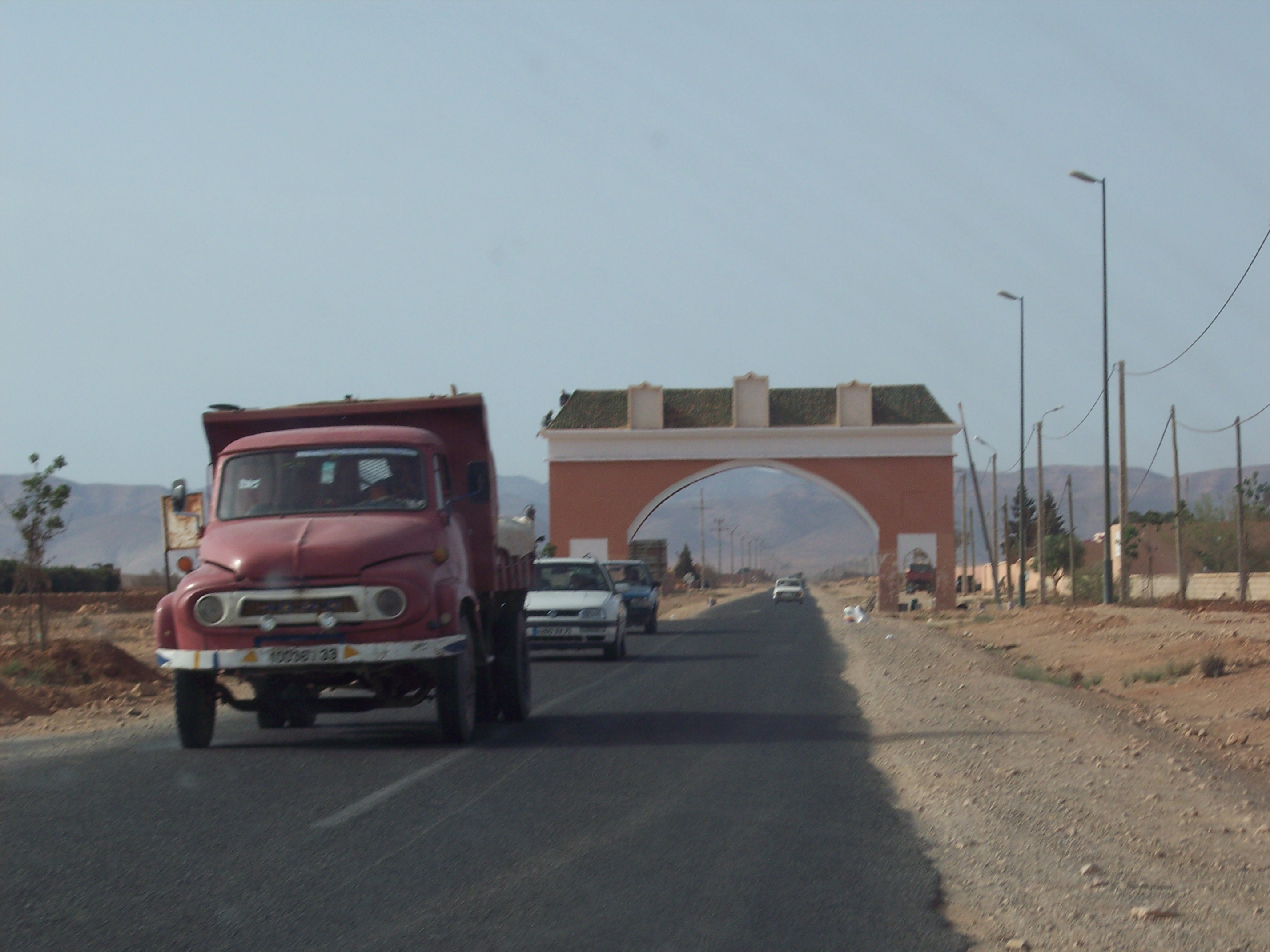 Porte de Guelmim, Maroc